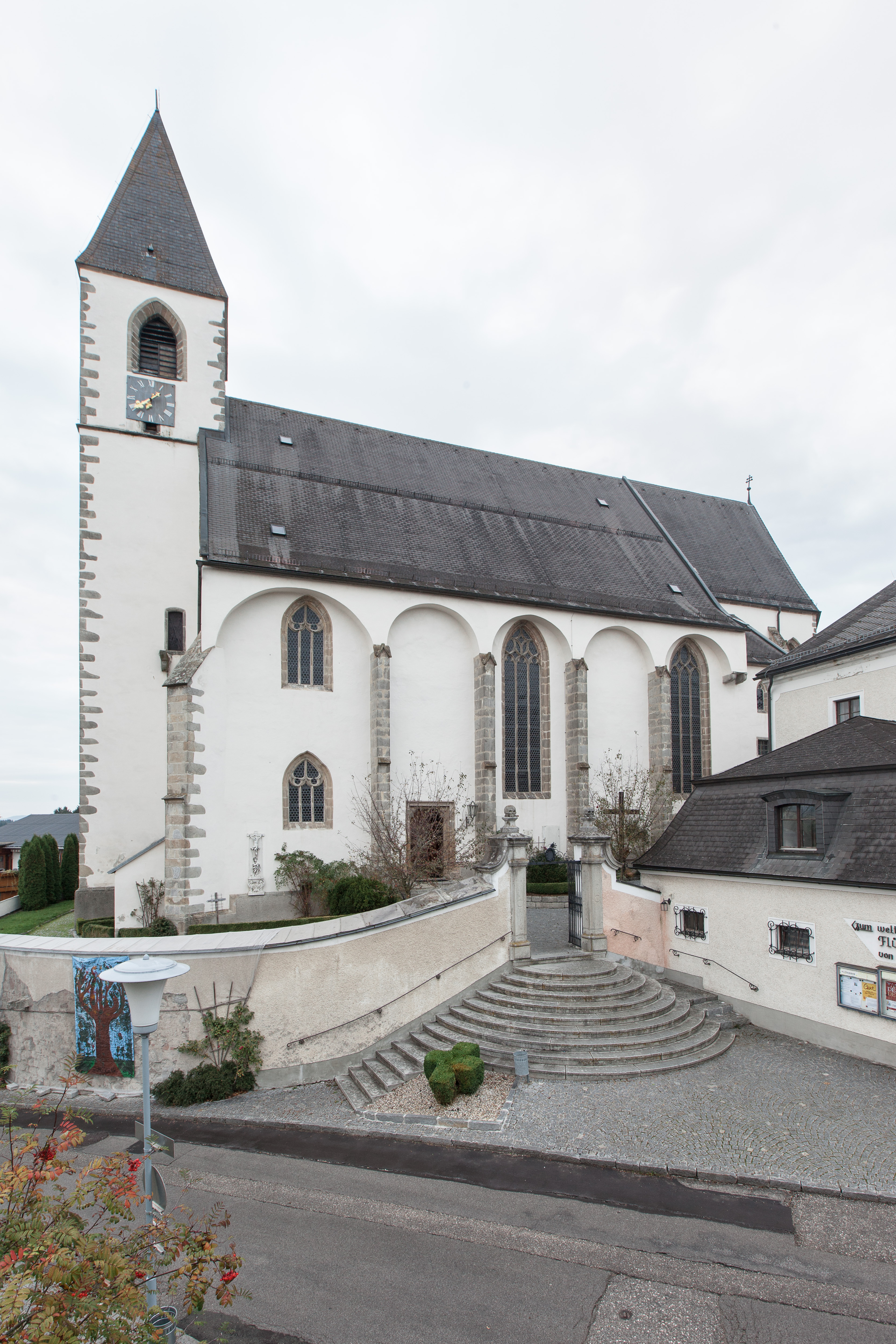 Aussenansicht Wallfahrtskirche Hl. Wolfgang